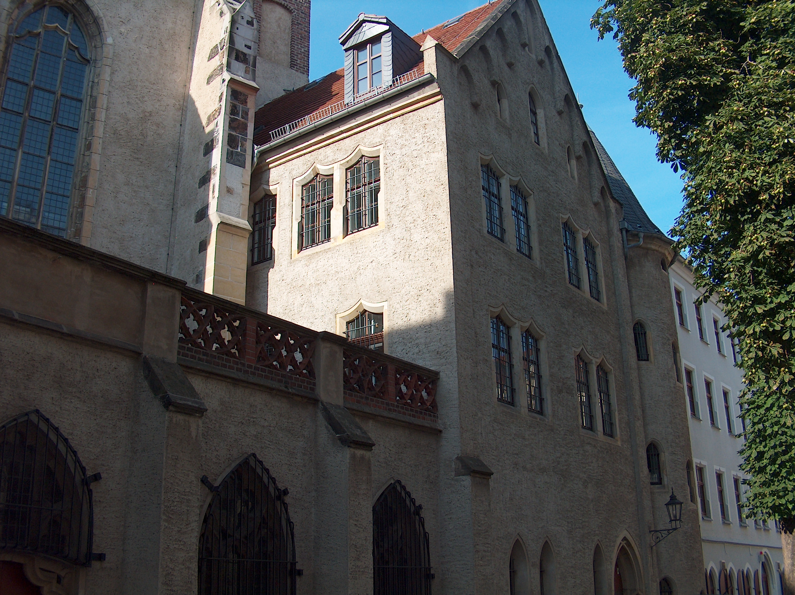 Stadtmuseum mit Bibliotek